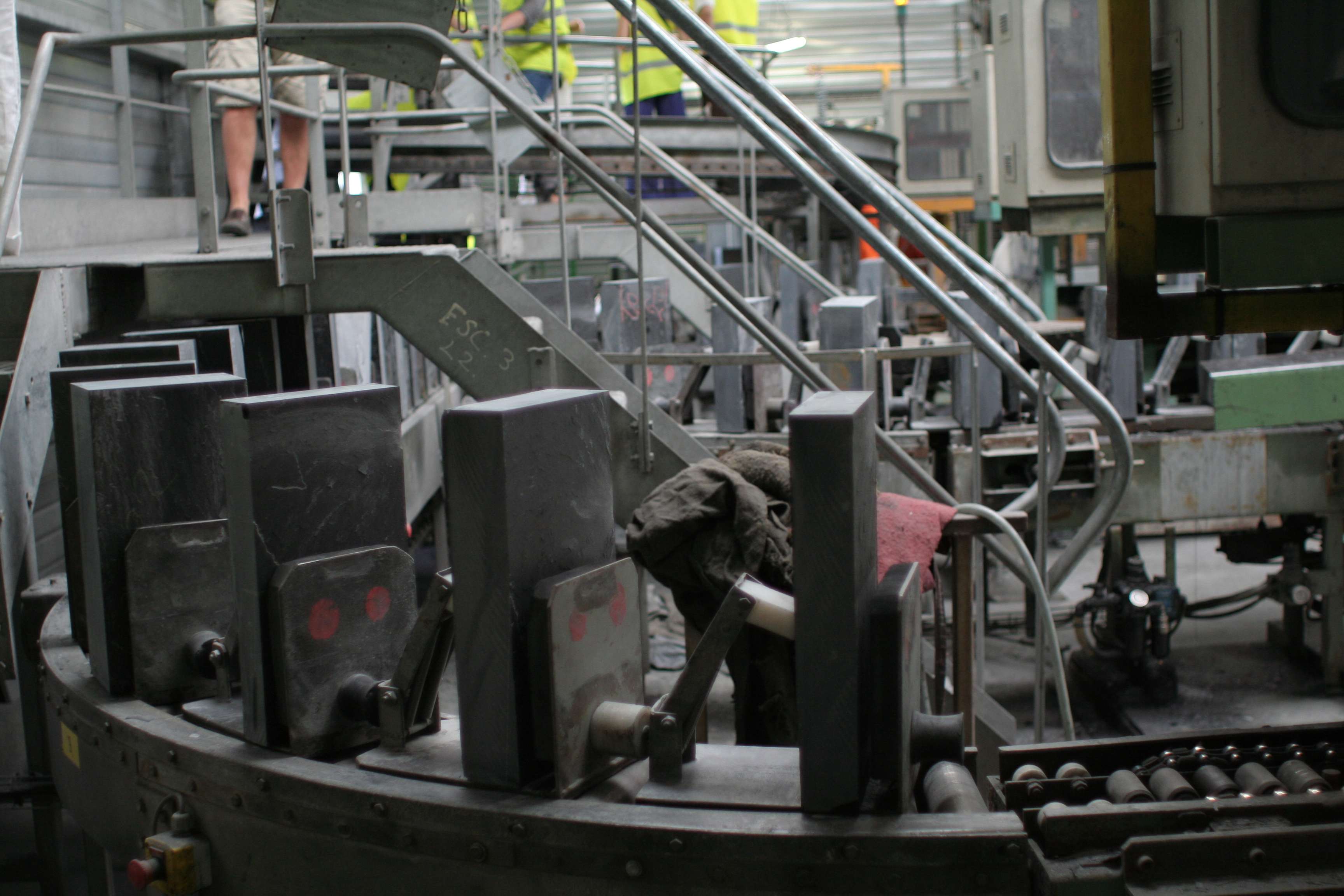 Ardoisière de Trélazé, Maine-et-Loire, France Repartons à la sortie du sciage, attendant d'être fendus.